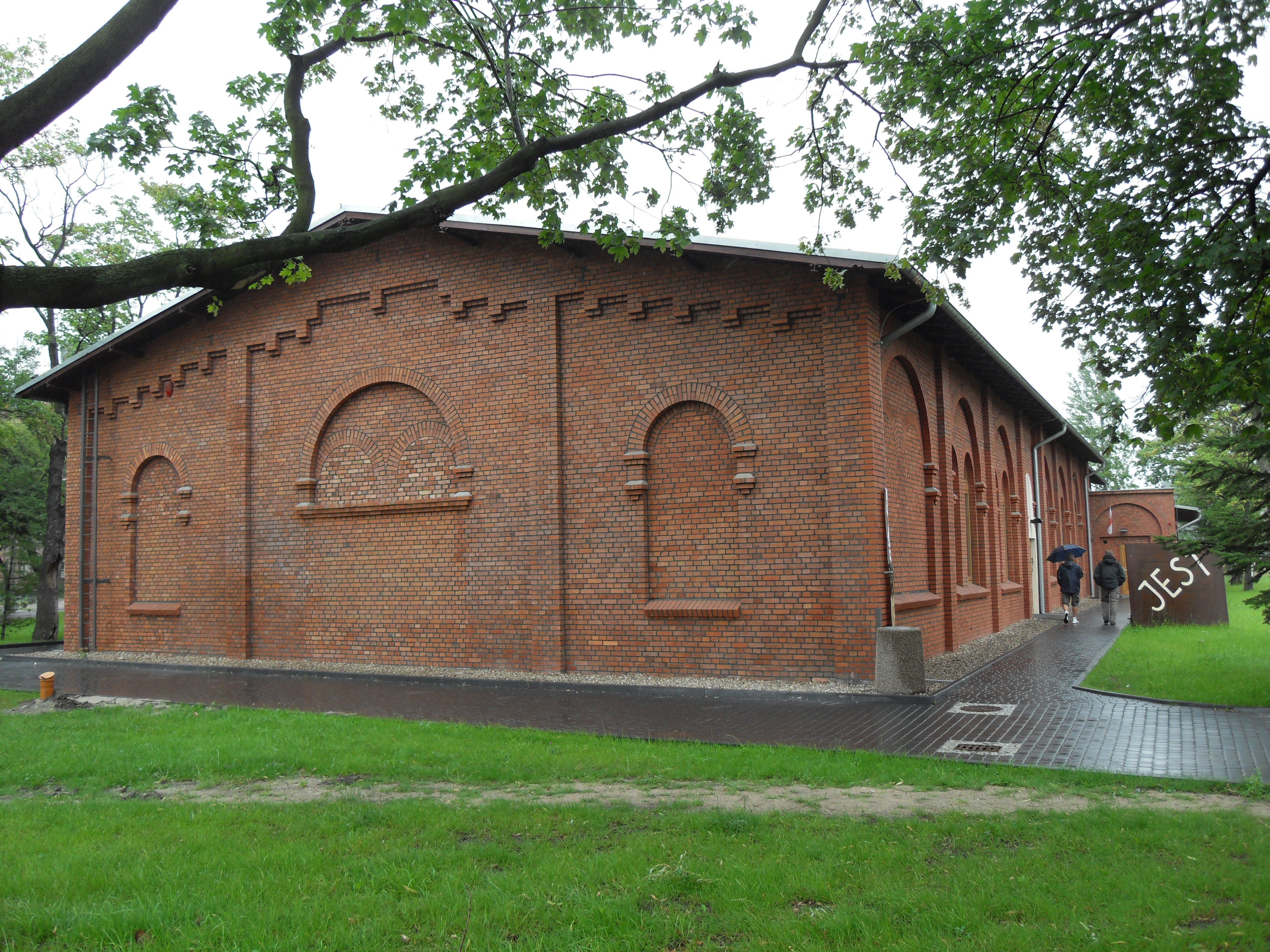 Stocznia Gdańska, sala BHP.